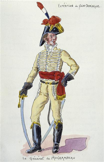 Général de Vimeur, vicomte de Rochambeau (1750-1812) ("Tenues des Troupes du Corps Expéditionnaire de Saint-Domingue. 1801-1804.")